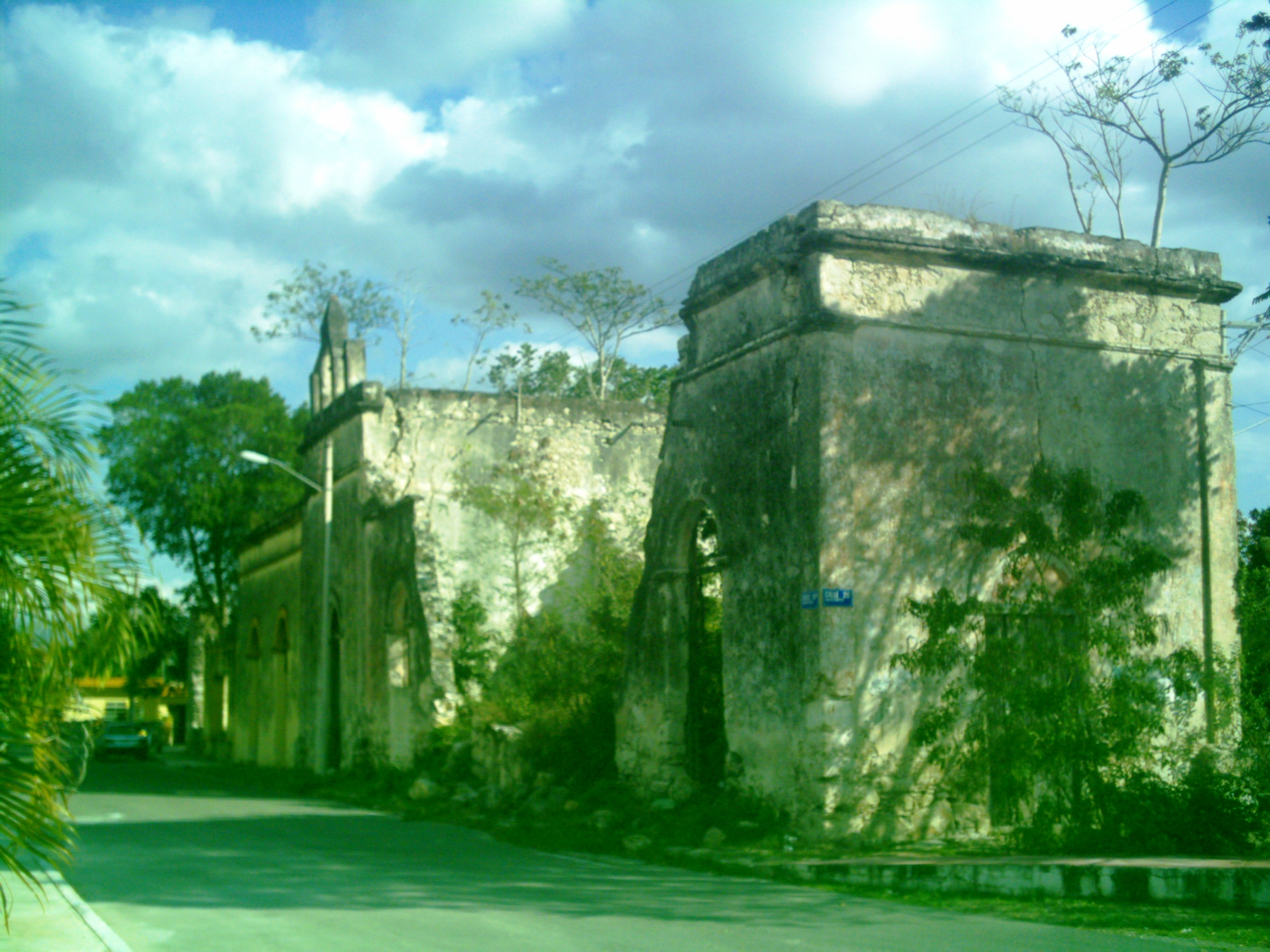 Iglesia de Tixcuytún (Municipio de Mérida), Yucatán.